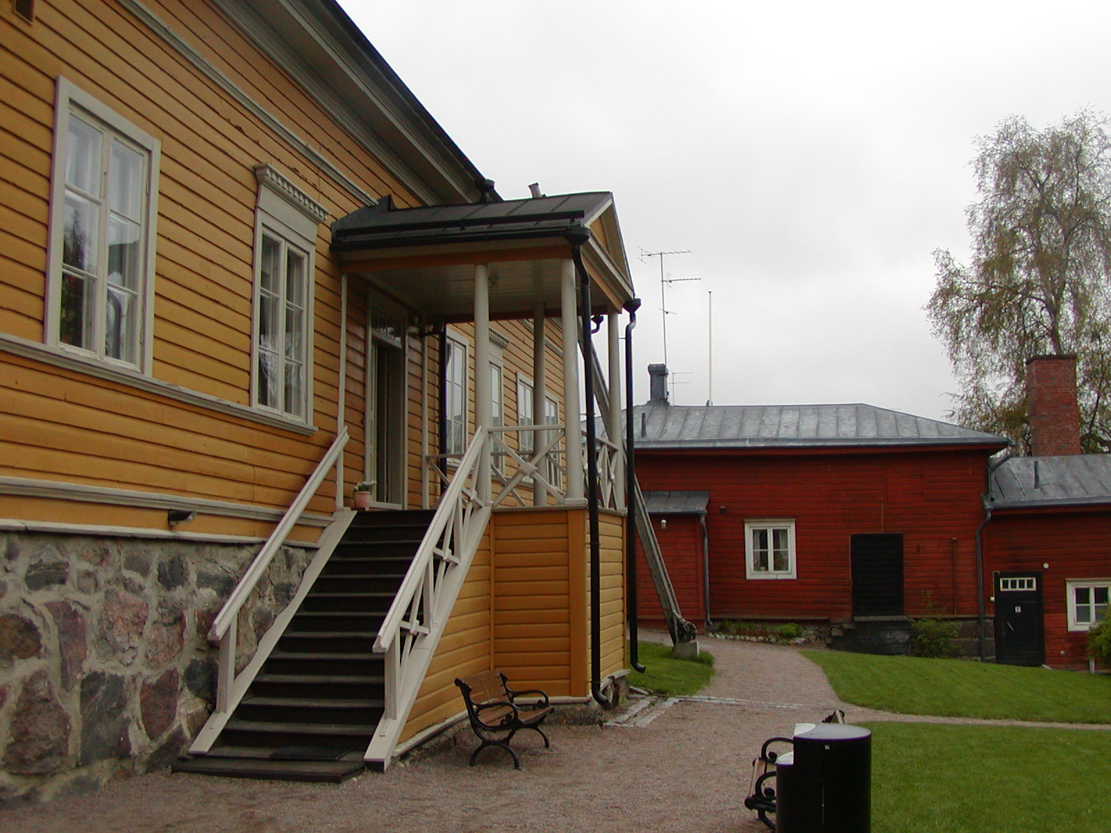 Home museum of Johan Ludvig Runeberg in Porvoo, Finland.